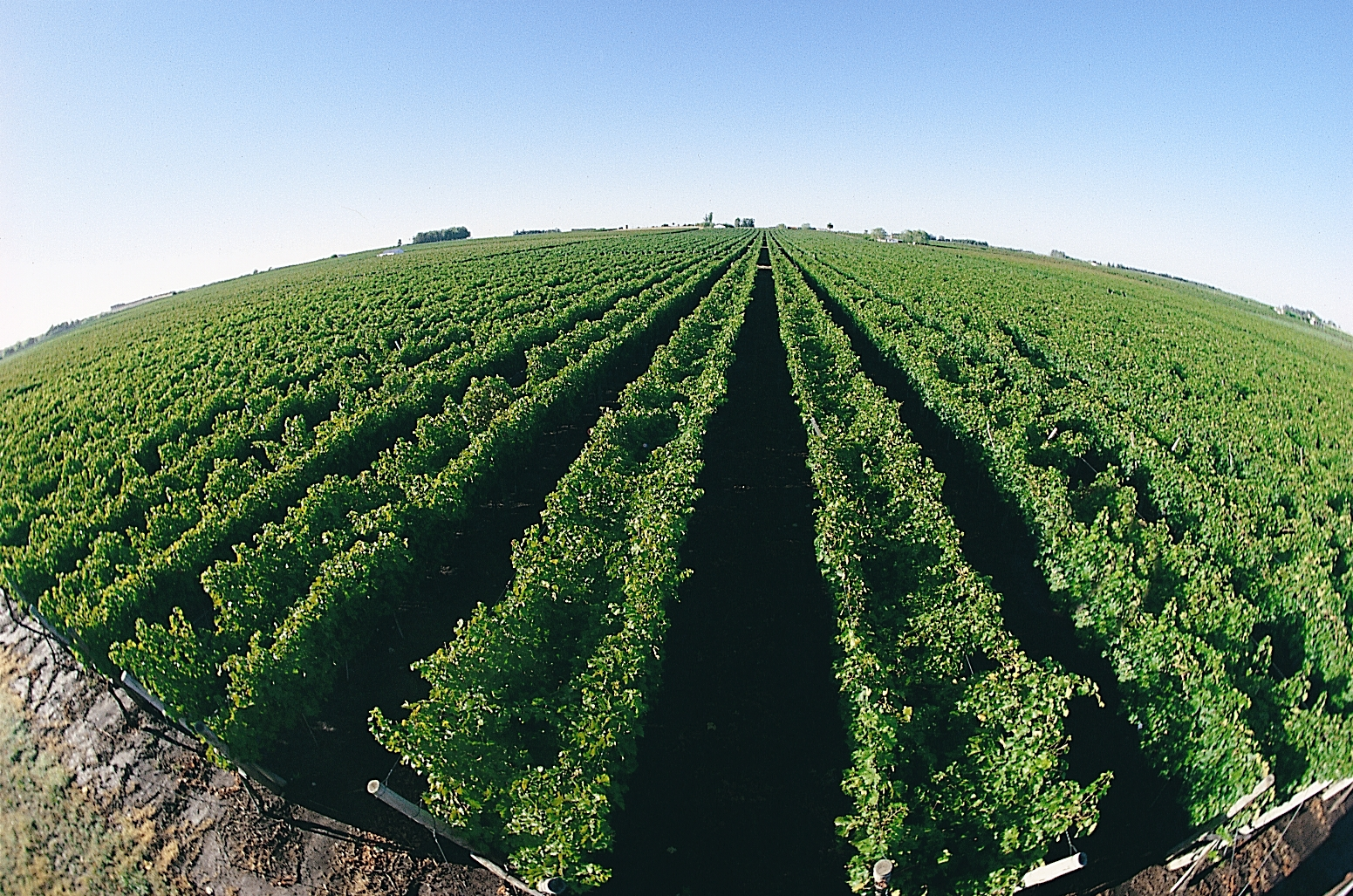 Viñedo con su sistema de conducción en Lyra